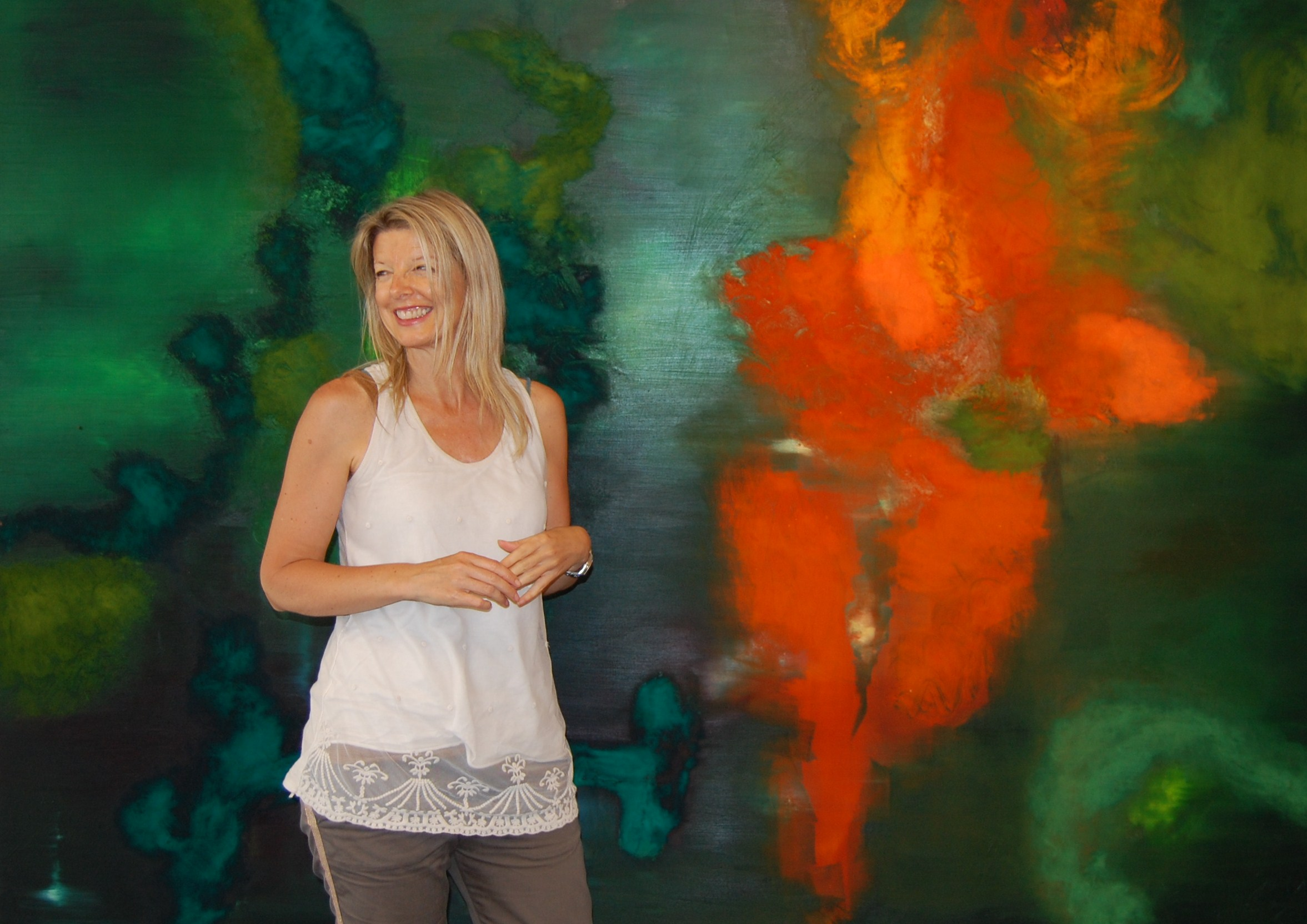 Brigid Ibell (* 1958) vor einem ihrer wandfüllenden Gemälde (Juni 2011)